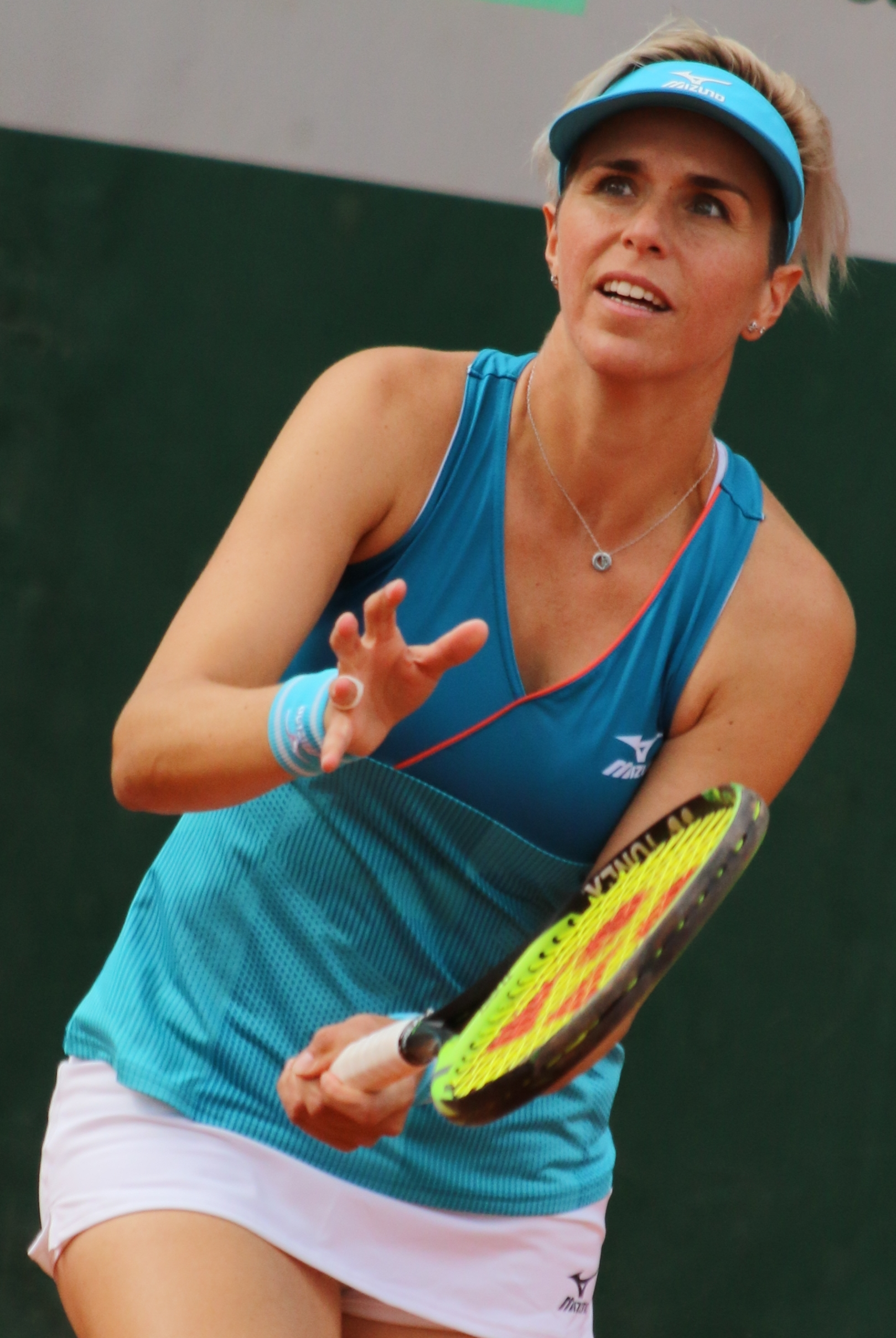 Martinez Sanchez RG19 (6)